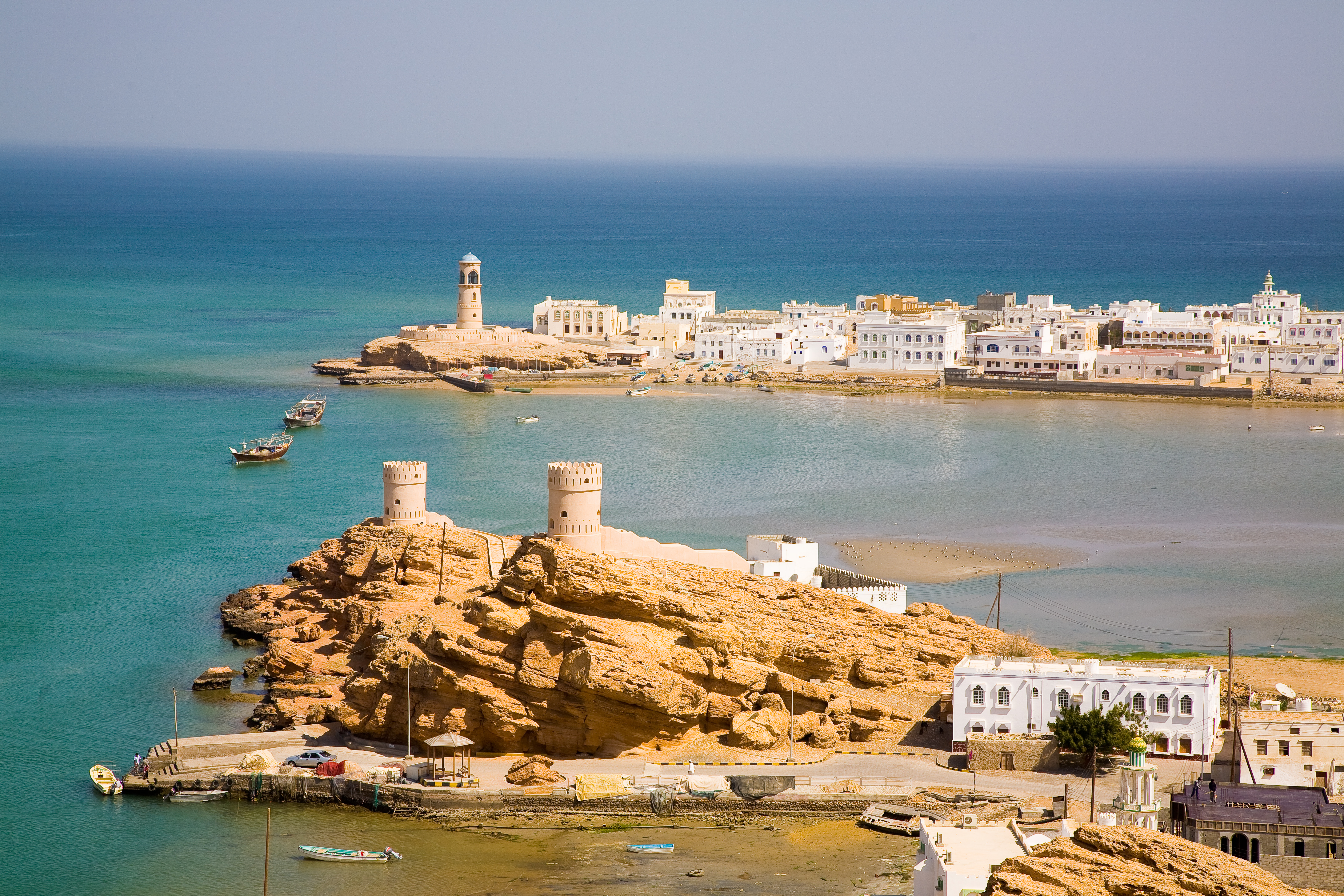 Sur, Oman